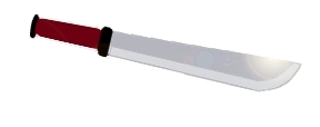 simil sable-rojo